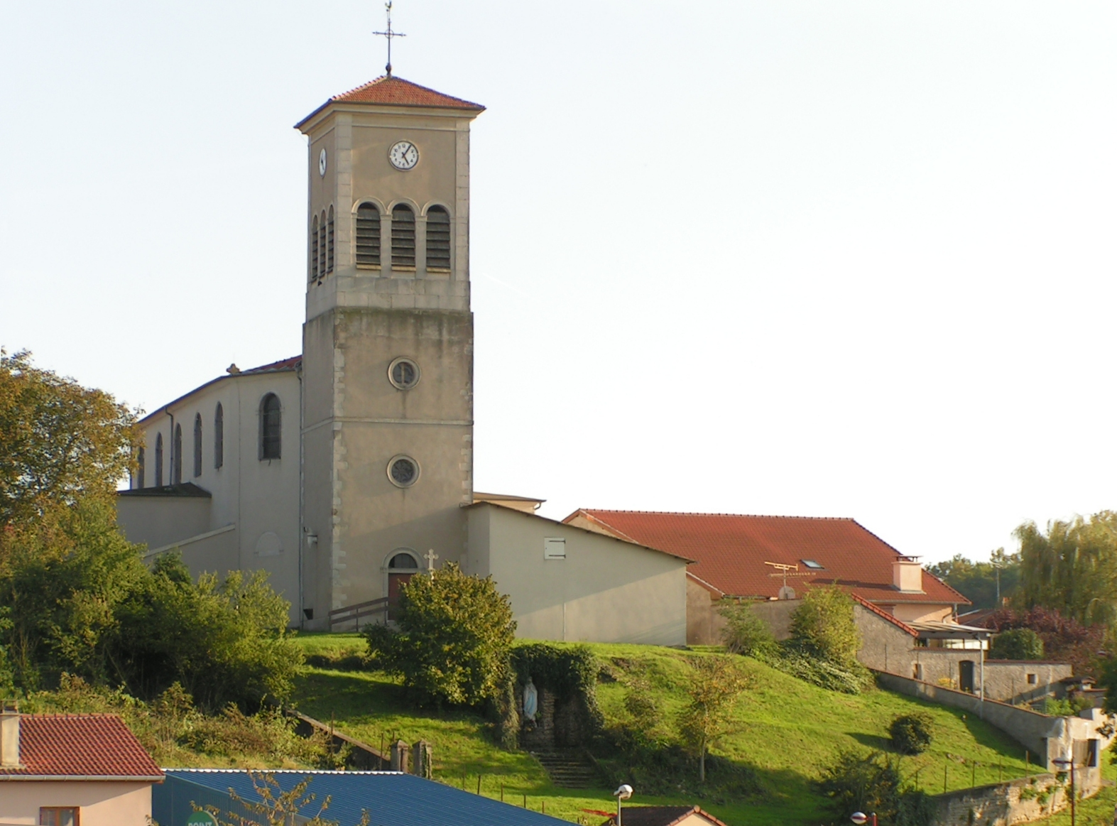 Eglise de Dommartin-lès-Toul (54200-France) prise en automne 2006 du coté du pont de Toul.